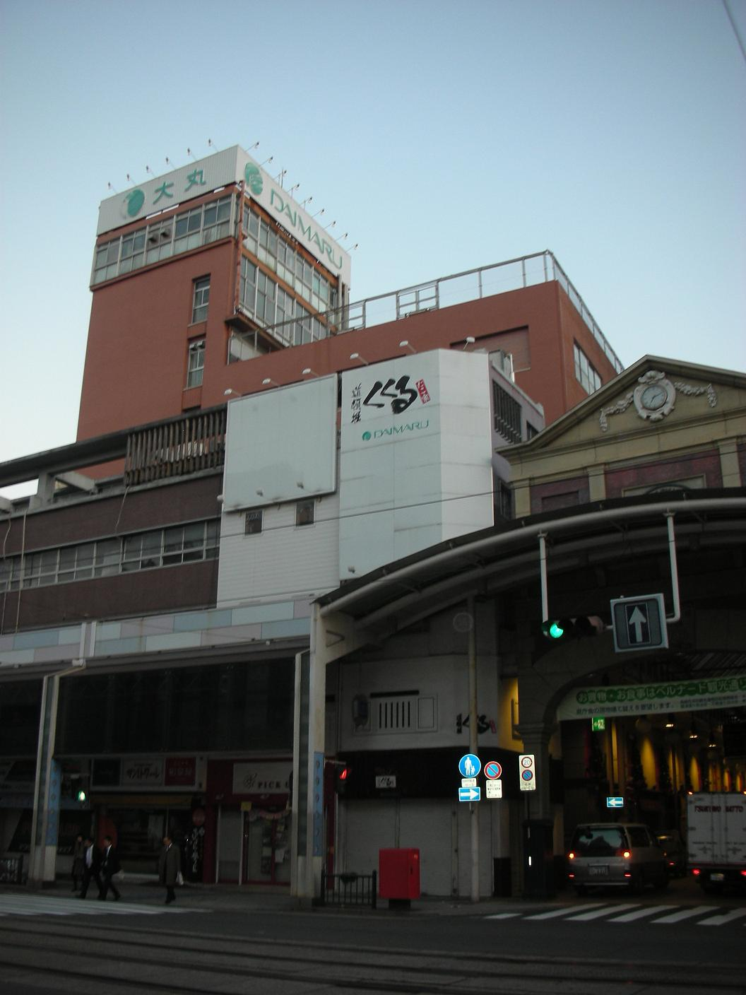 大丸長崎店